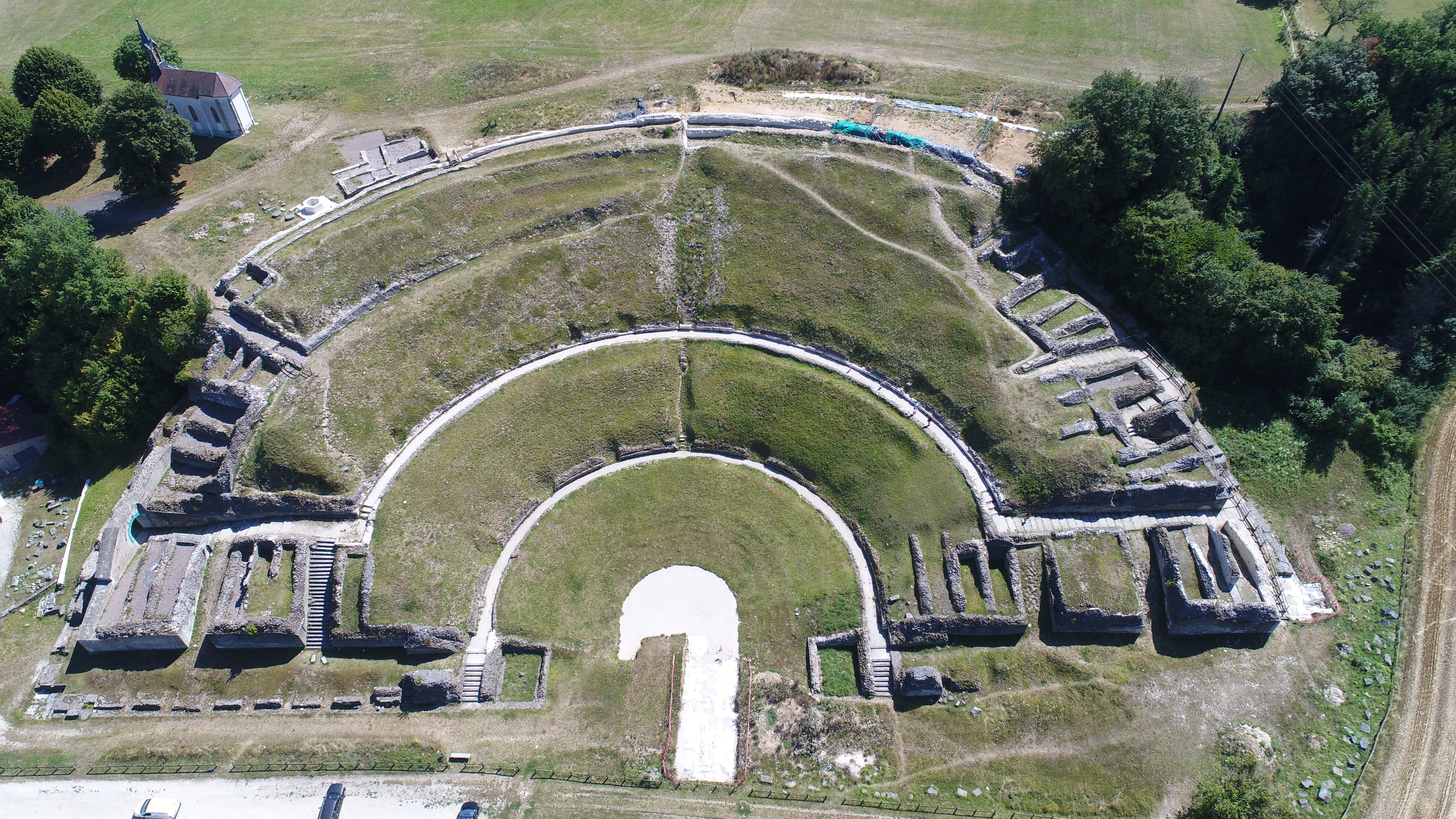 Vue aérienne du théâtre gallo-romain de Mandeure (25).